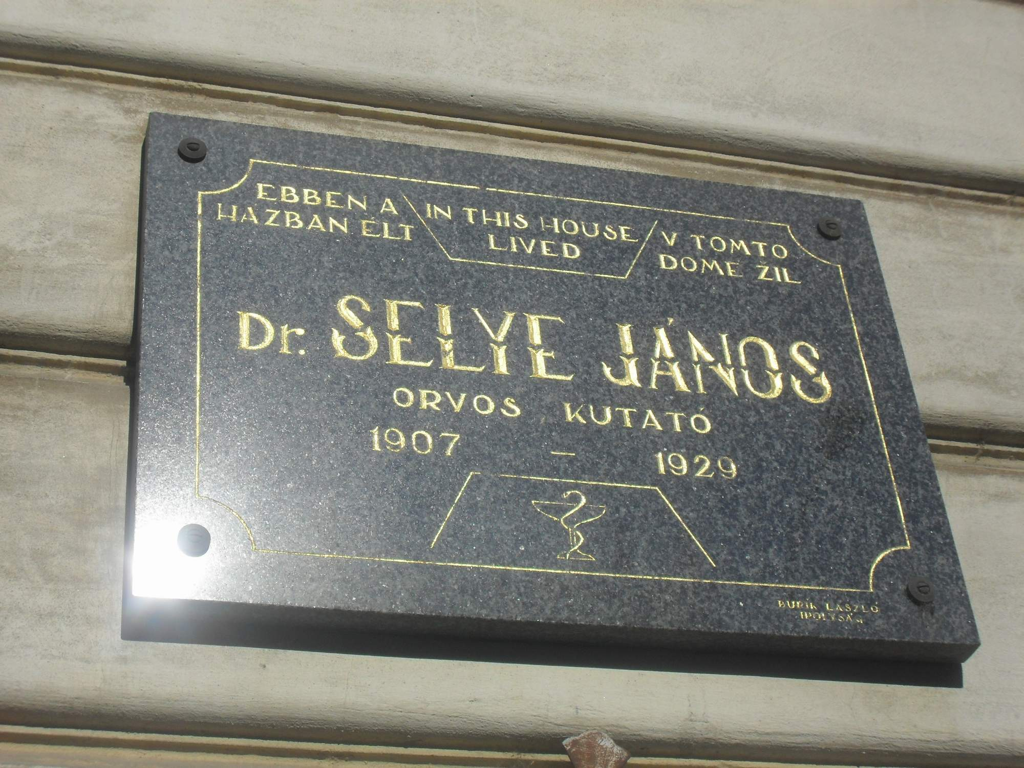 Komárom (SK) - Selye János-emléktábla (Határőr utca)